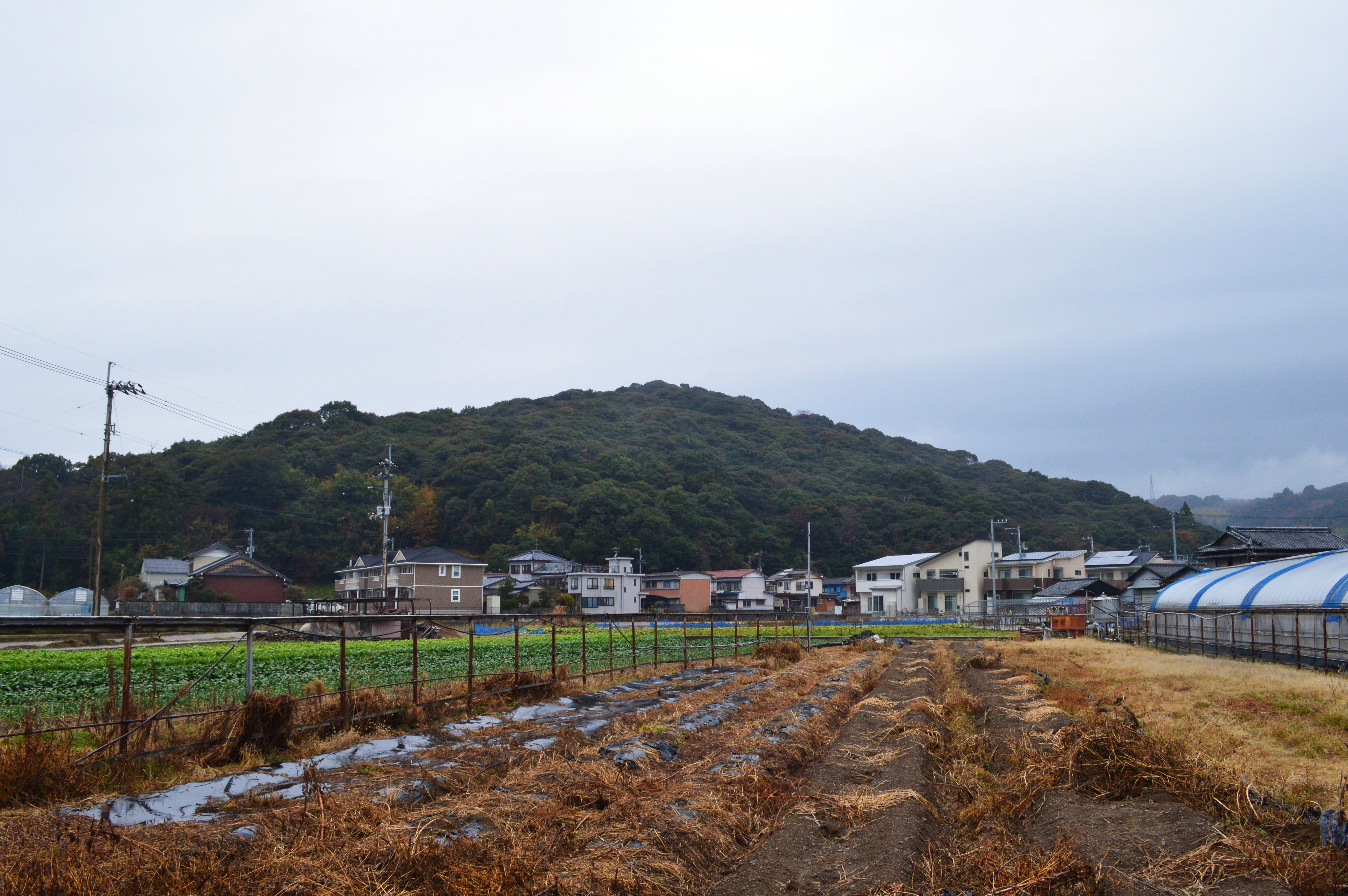 赤鬼山 全景